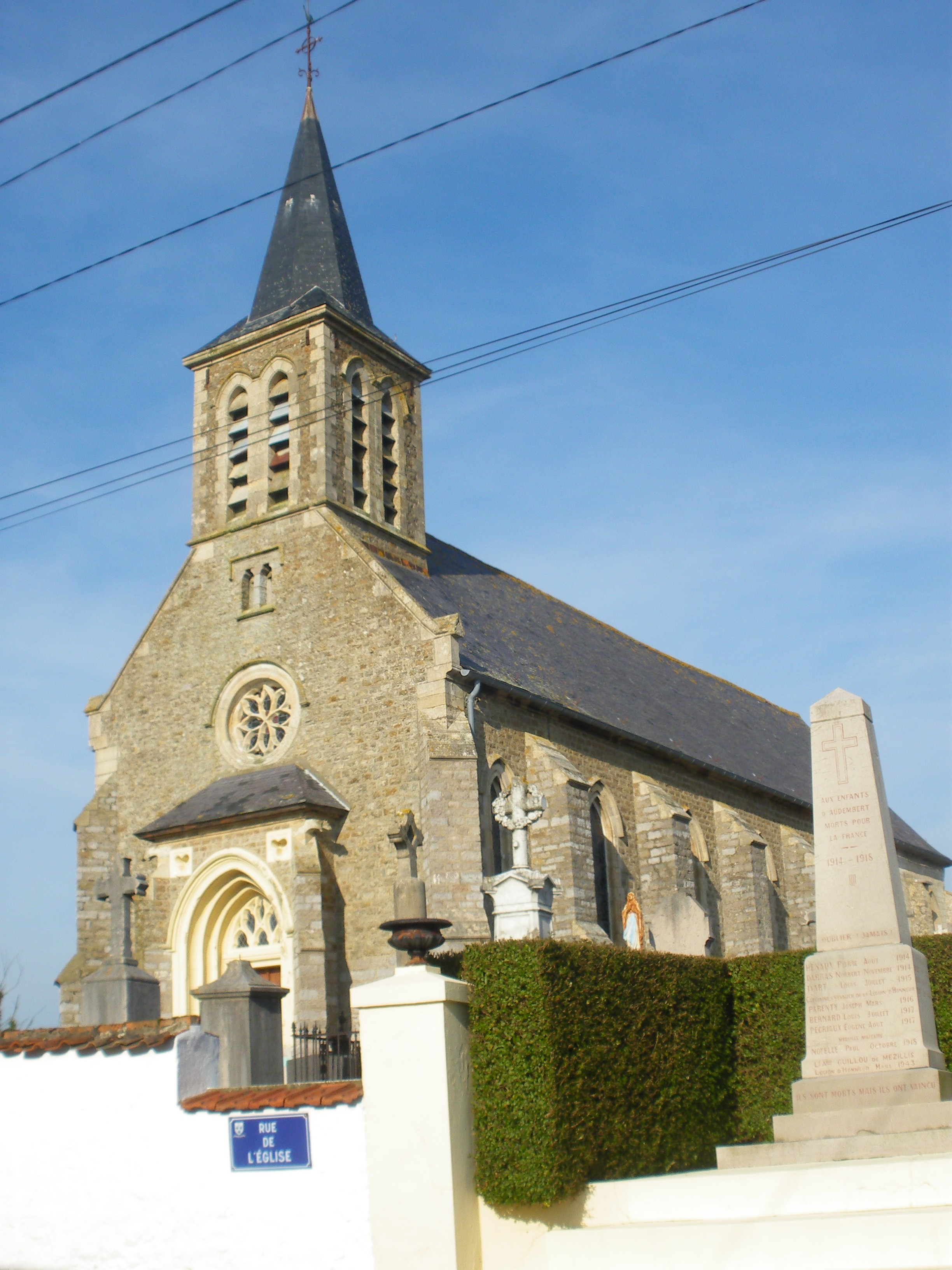 Vue de l'église Saint-Martin et du monument aux morts d'Audembert.